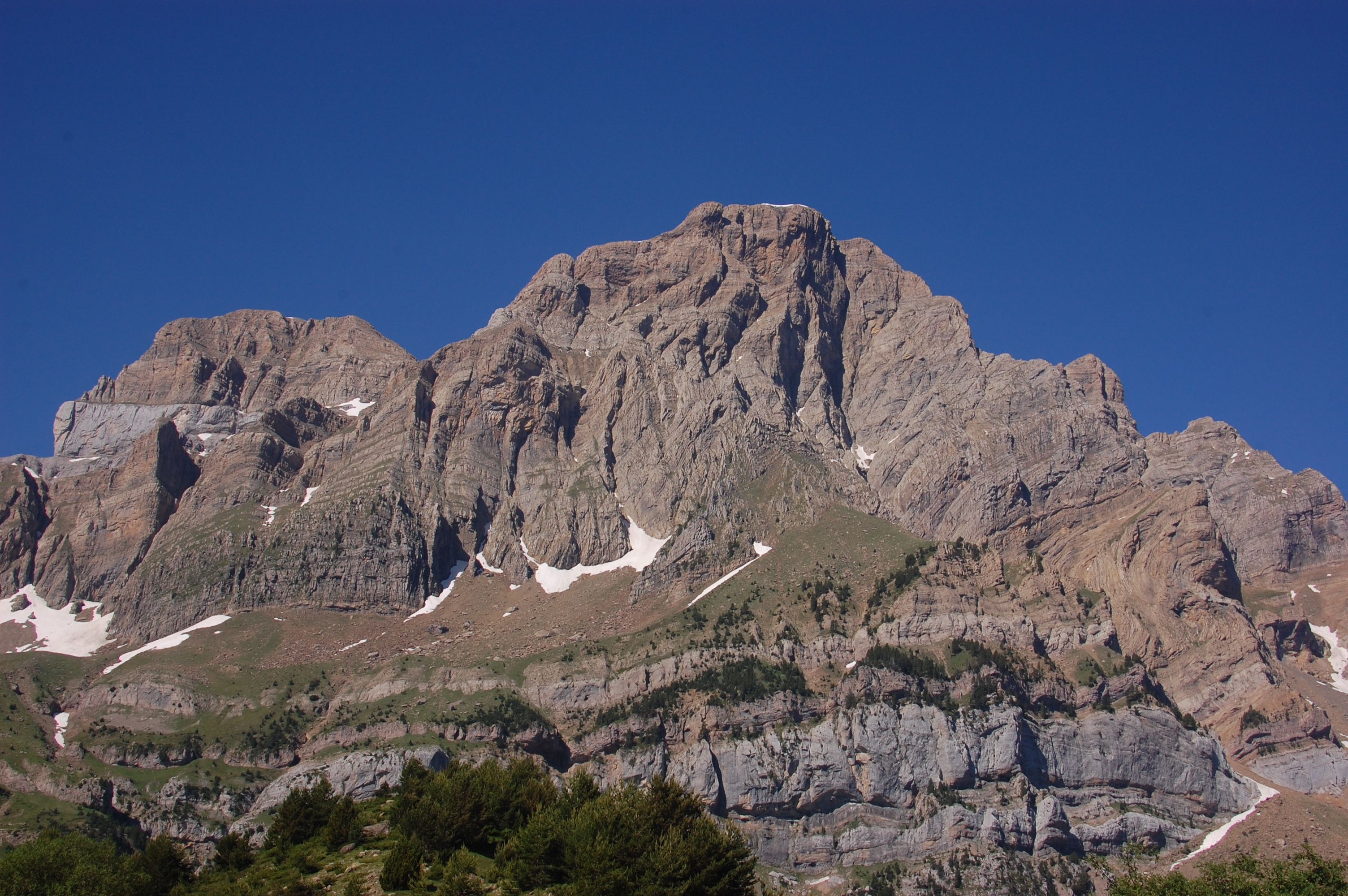 Aragonés: Penya Telera